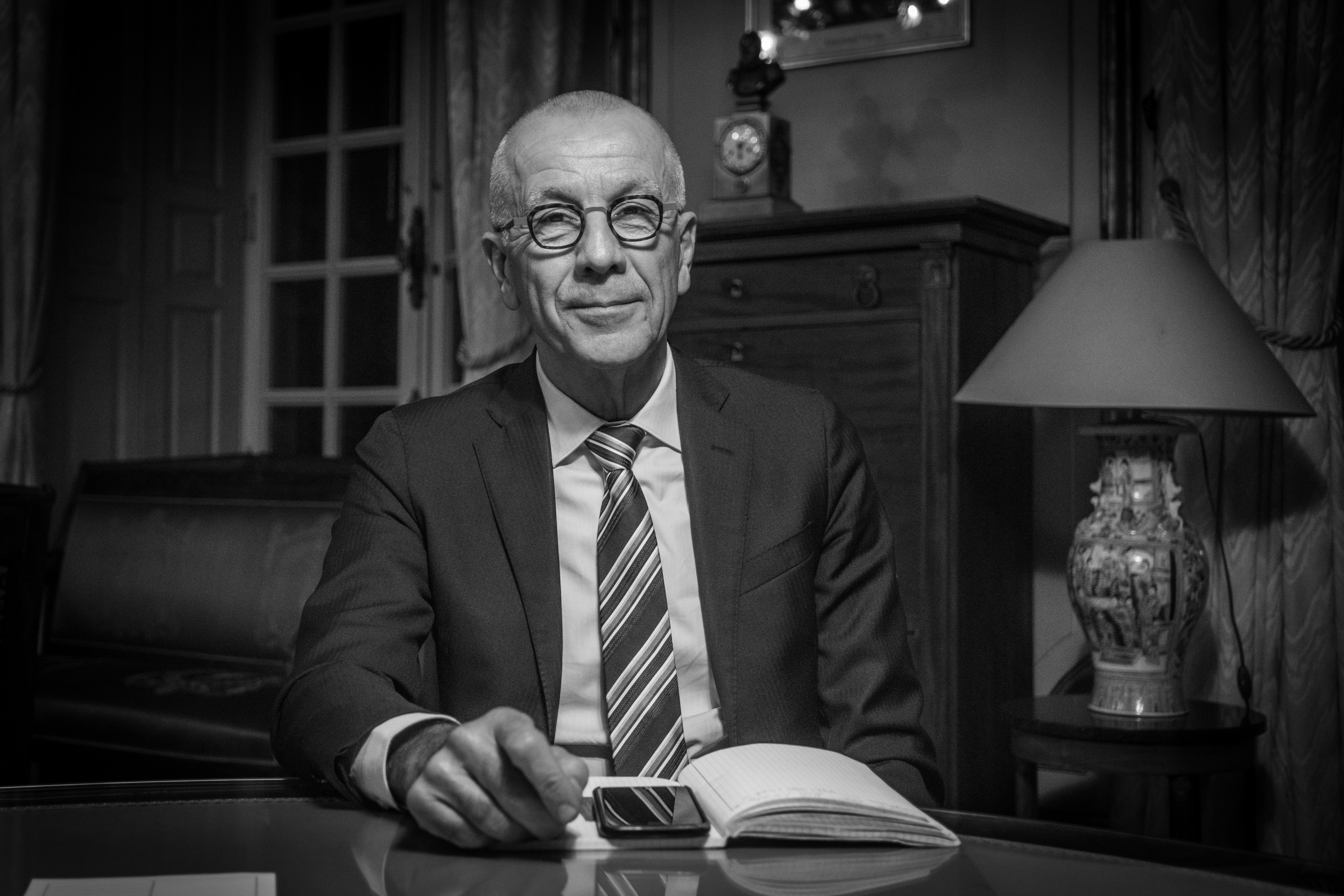 Jean-Luc Marx par Claude Truong-Ngoc.